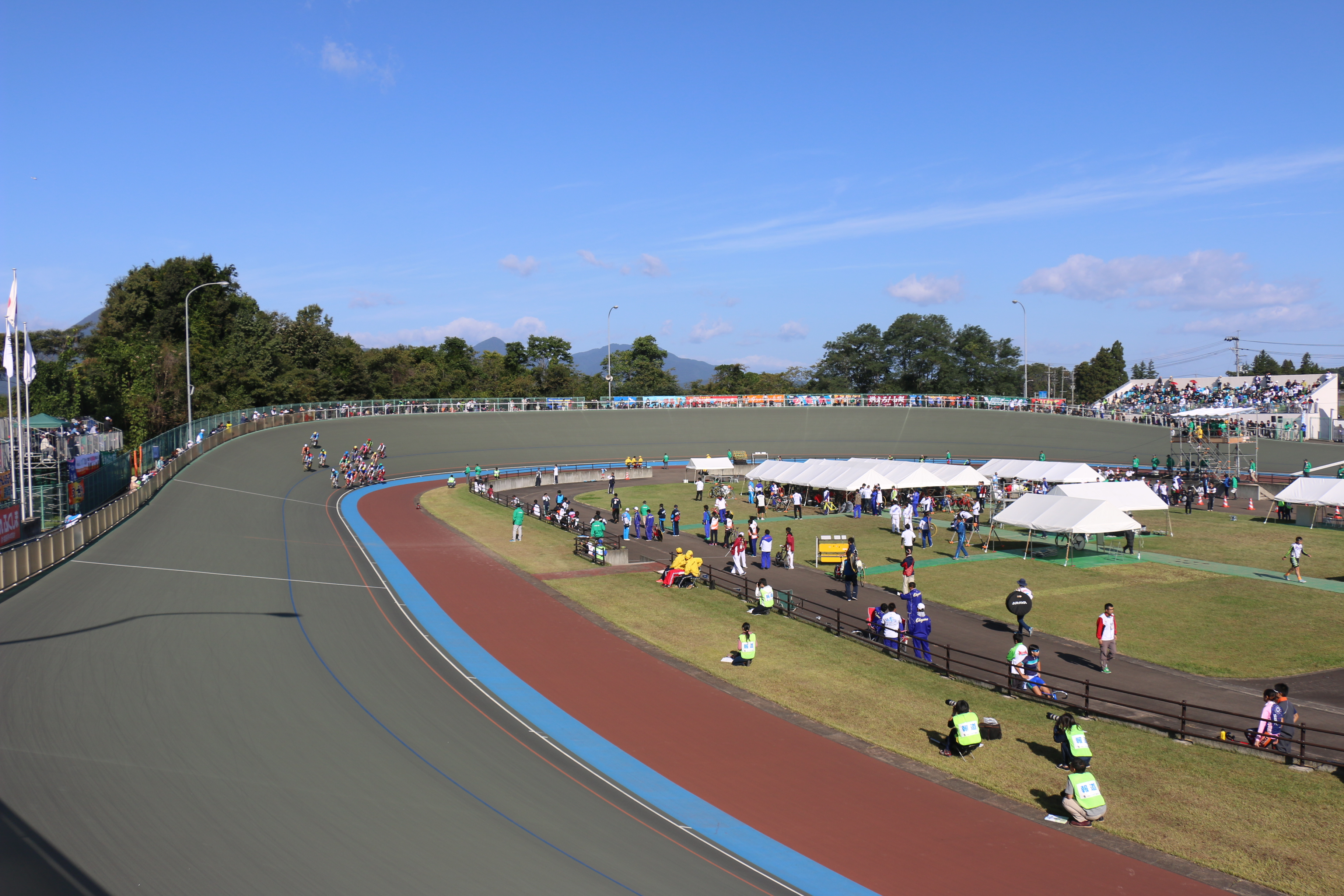 紫波自転車競技場 2016年10月7日撮影